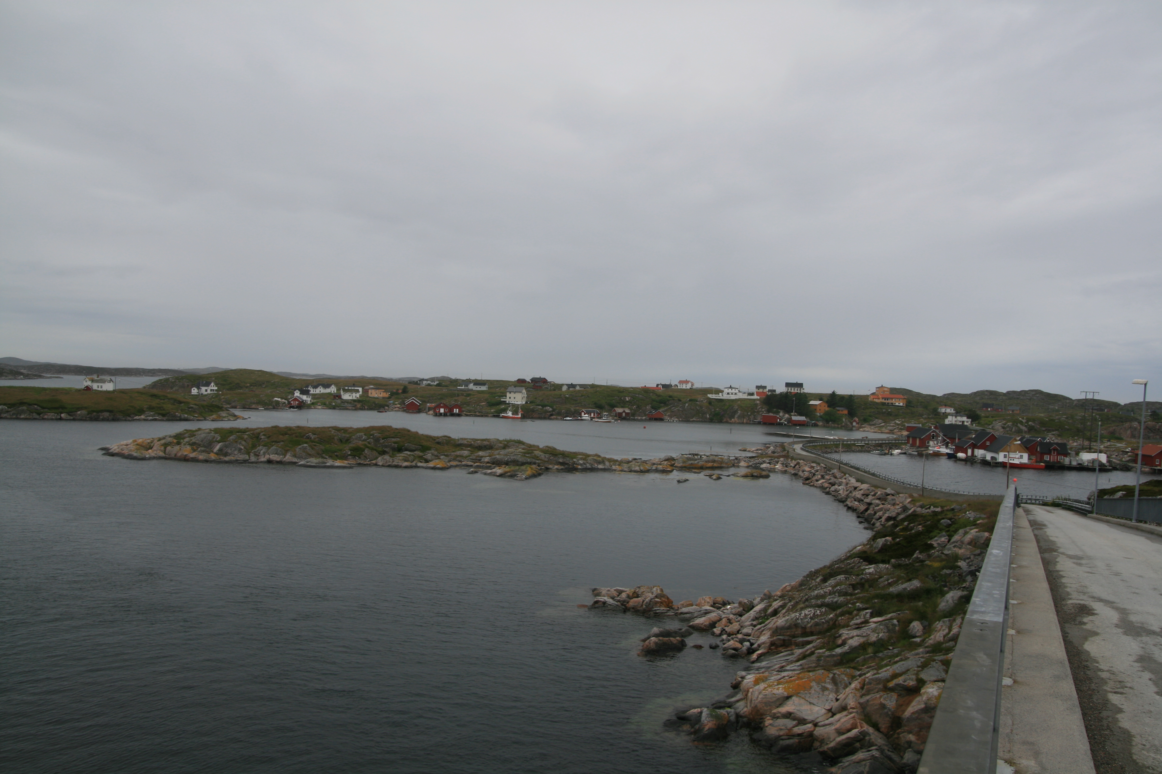 Utsikt over Aursøya